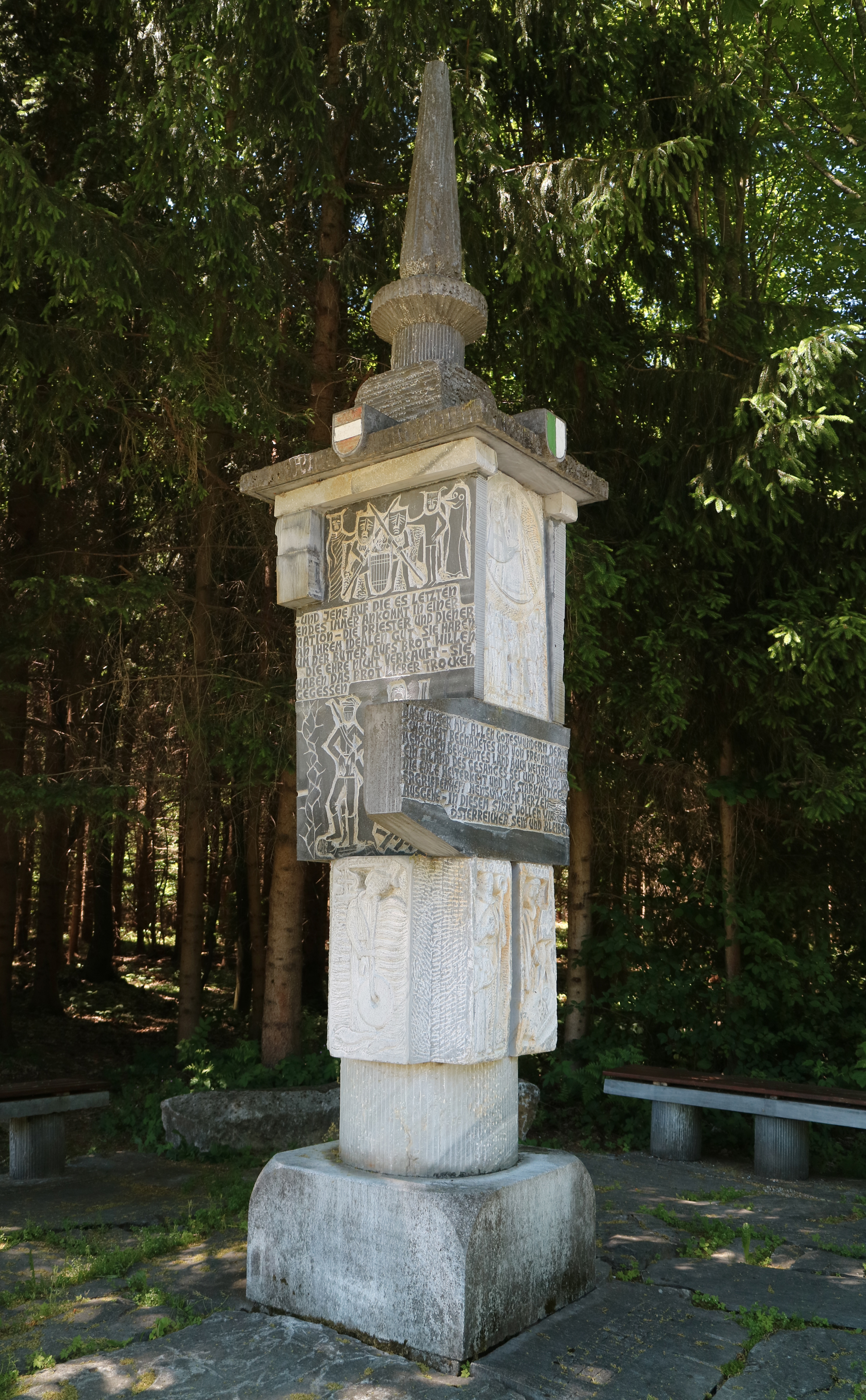 Anton-Wildgans-Gedenkstätte bei St. Martin am Wöllmißberg von Alfred Schlosser (1996)